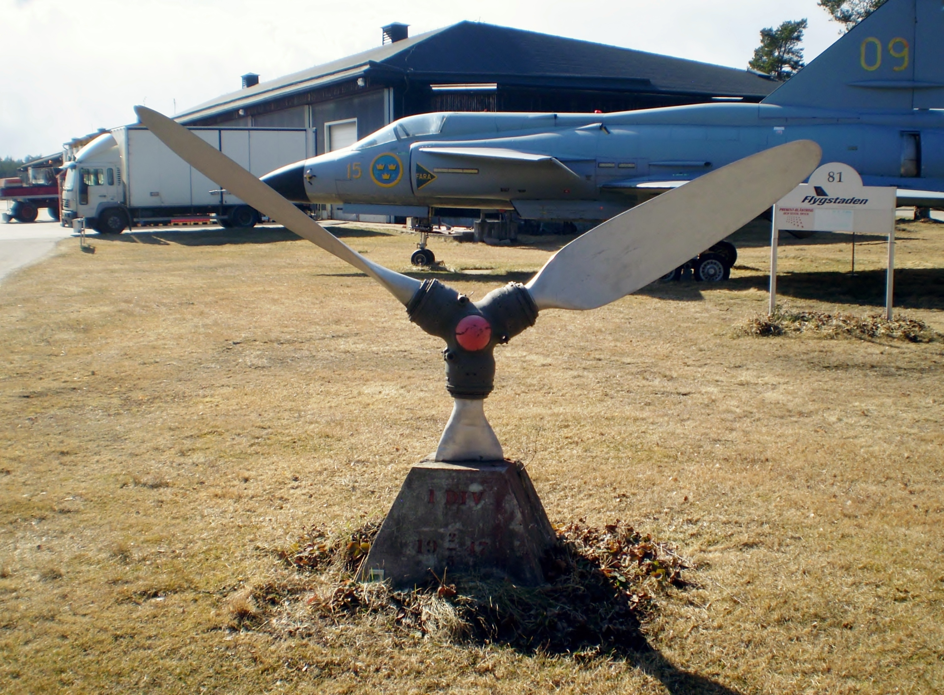 Minnessten över 1:a divisionen (Olle Röd) vid Hälsinge flygflottilj. Minnesstenen är placerad utanför F 15 flygmuseum i Söderhamn. Stenen har texten "1 Div, 2 maj 1947".